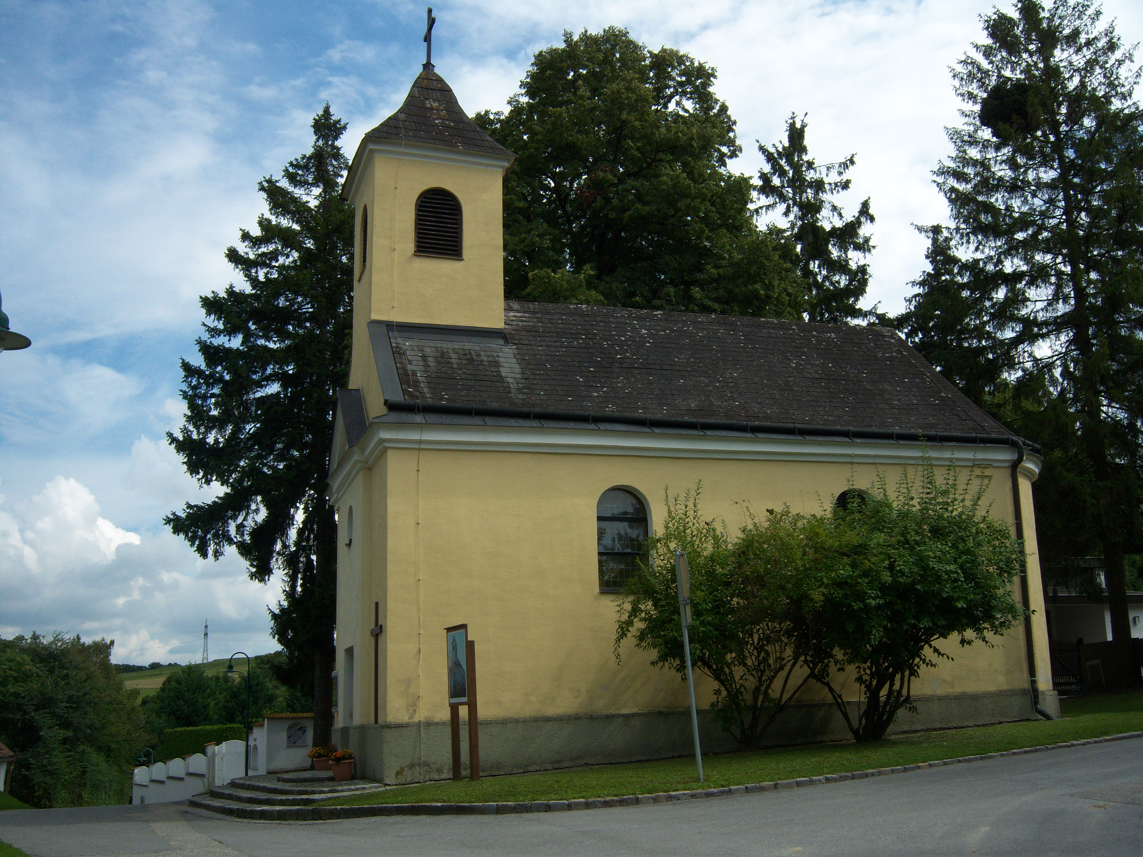 Katholische Filialkirche heiliger Franz Xaver in Riedenthal (Stadtgemeinde Wolkersdorf im Weinviertel)